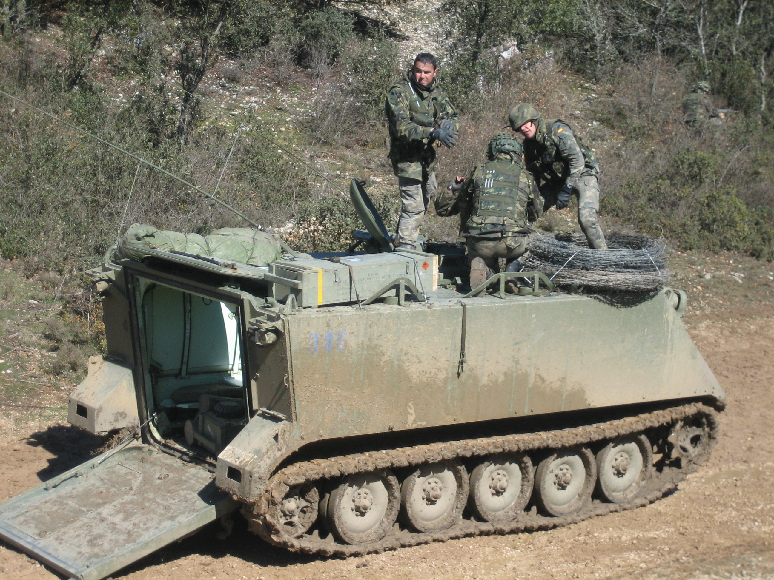 TOA Ejercito Español